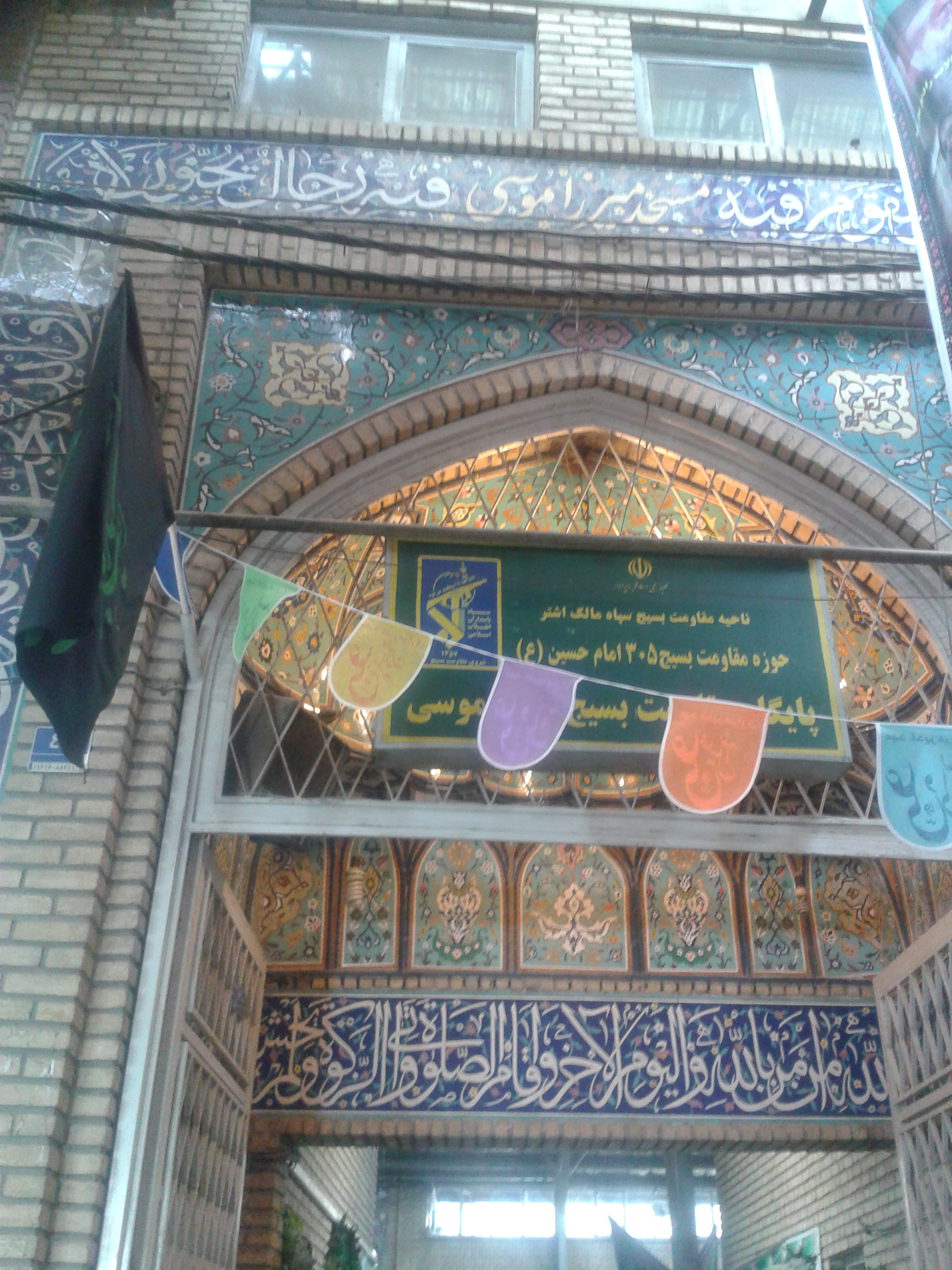 مسجد میرزا موسی